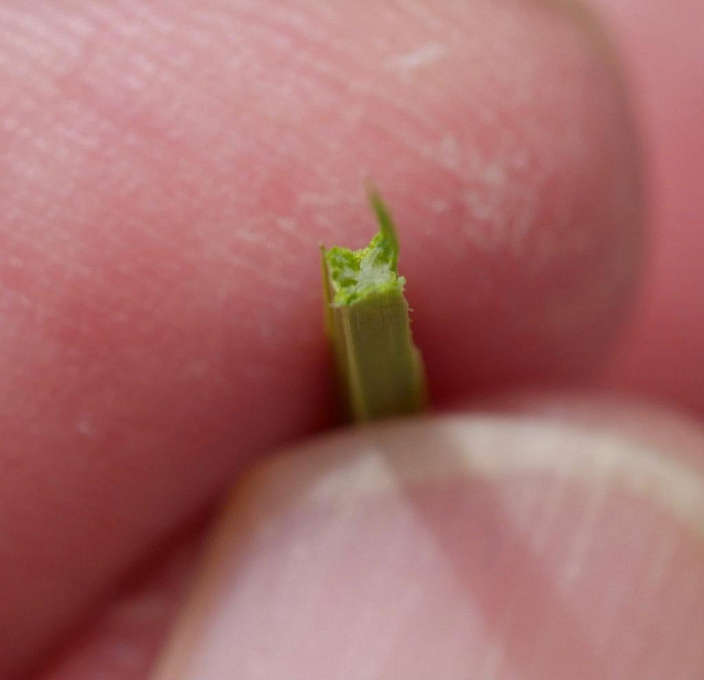 Eleocharis wichurae：シカクイ 2018/09/10 和歌山県：Wakayama Pref. Japan